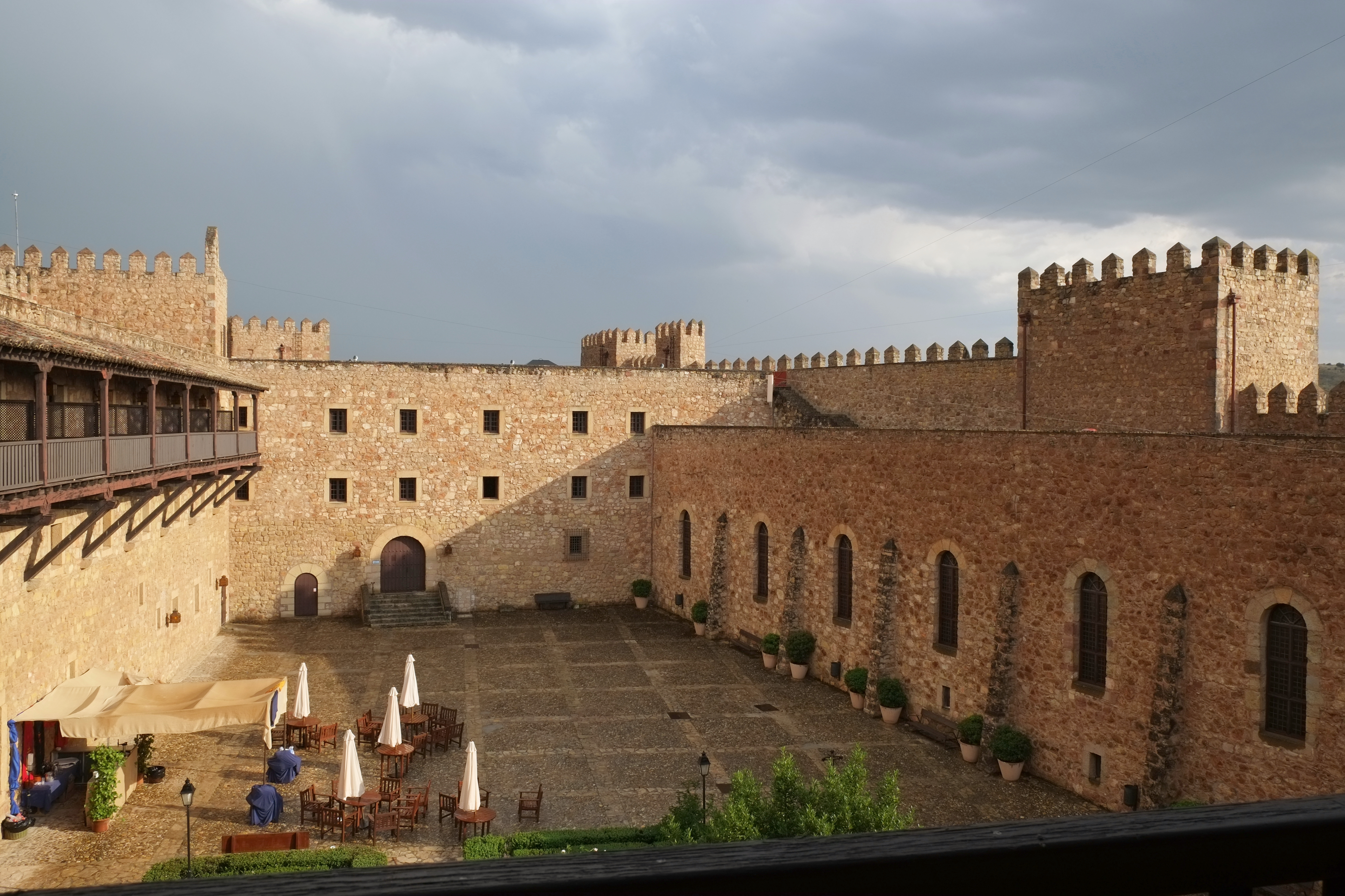 Burg in Sigüenza in der Provinz Guadalajara in Kastlien-León (Spanien)